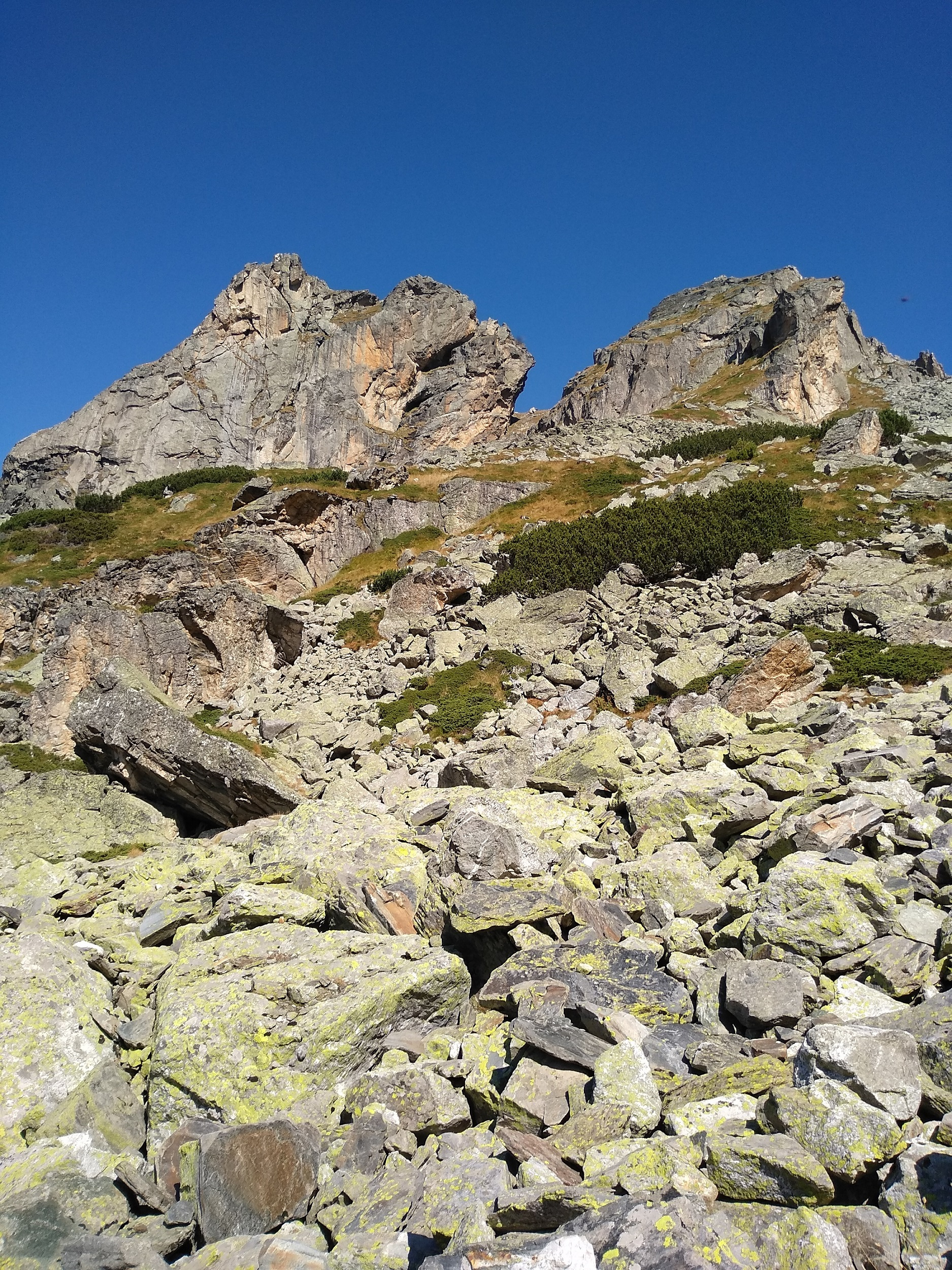 Връх Ушите (Рила) откъм Урдиния циркус